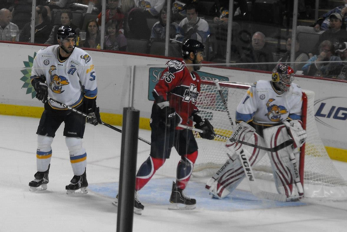 Toledo Walleye vs. Kalamazoo Wings 2012 home opener. #5 Wes O'Neill, # 1 Petr Mrazek, # 25 Darren Archibald